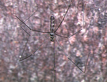 male Pholcus nagasakiensis from Okinawa.